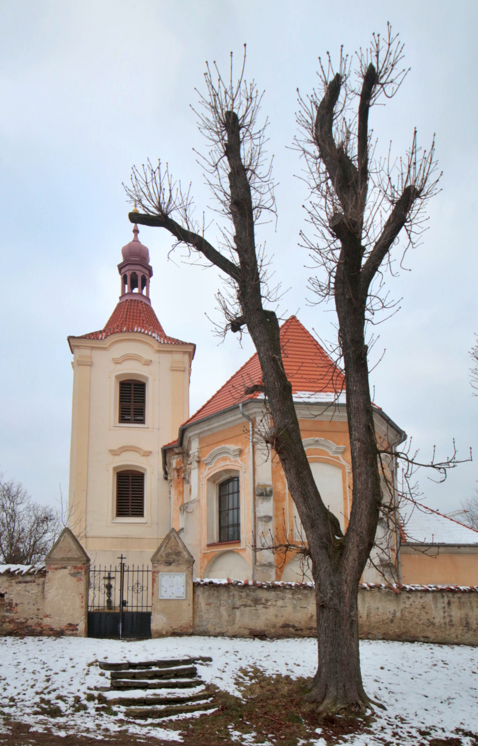 Sluštice